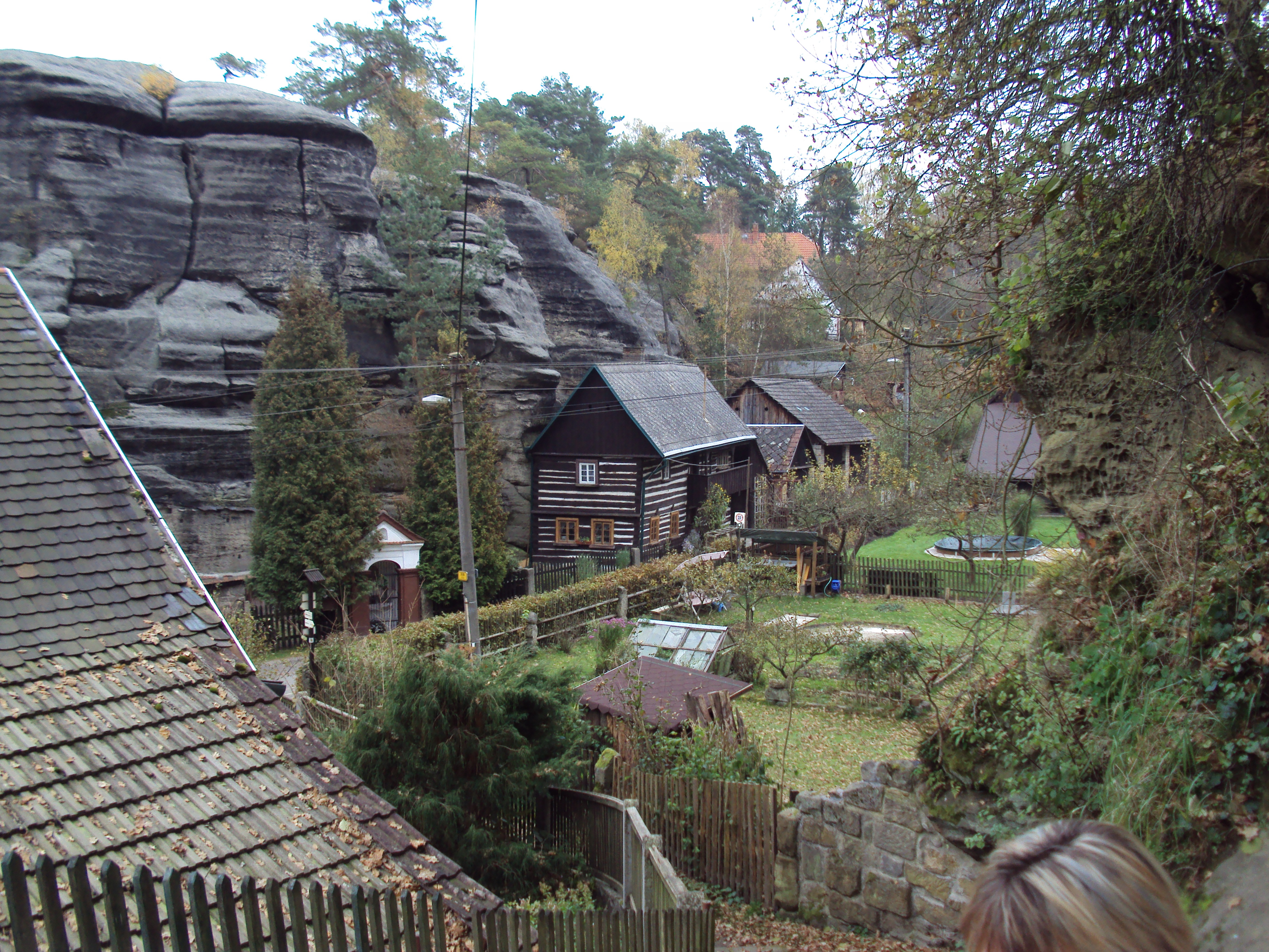 Osada Karba u Zahrádek shora